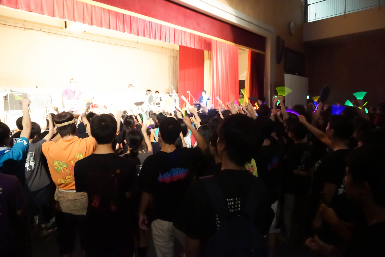 東京都立竹早高等学校、竹夕祭でのライブの様子